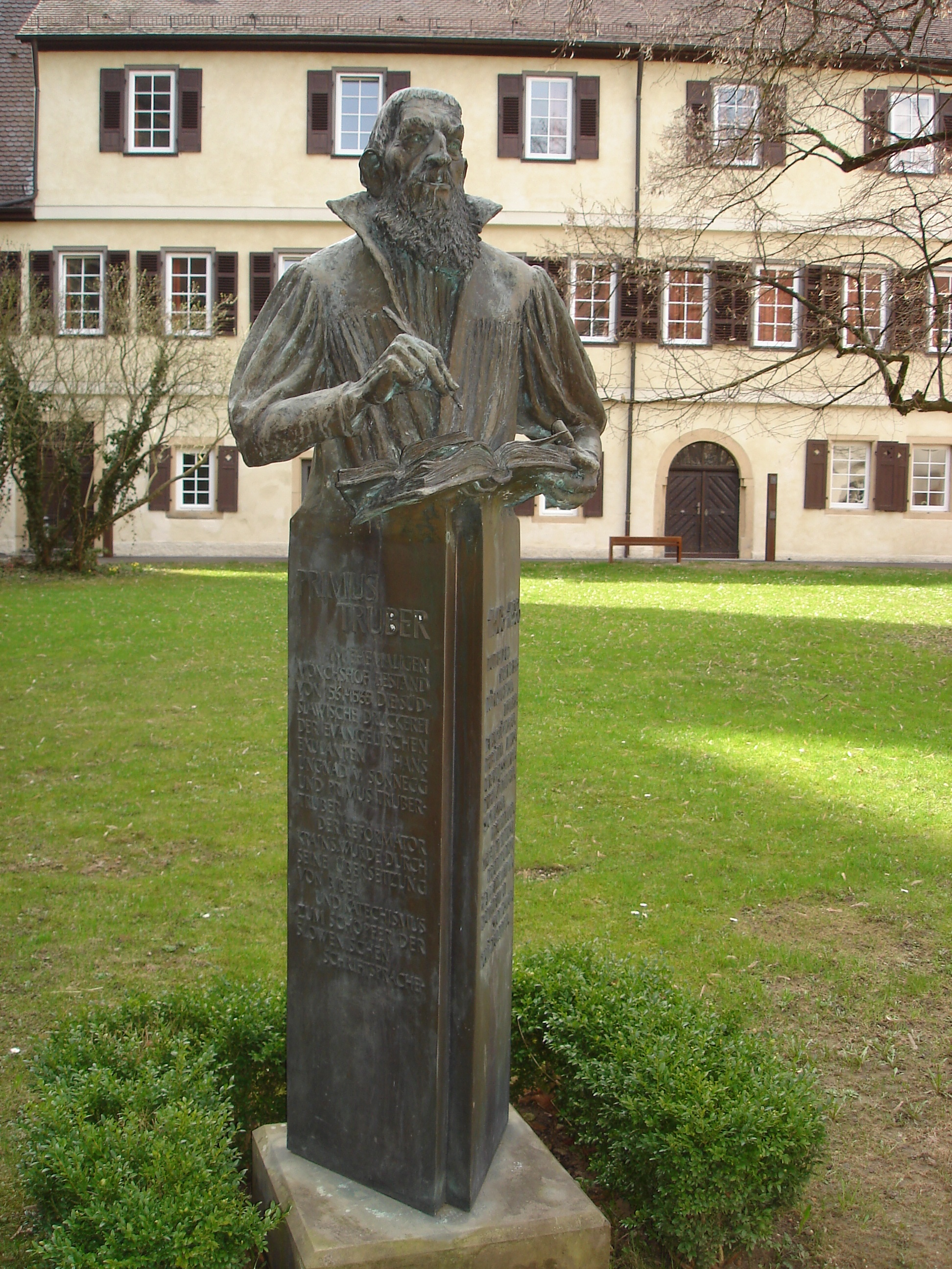 Denkmal für Primus Truber (Primož Trubar) in Bad Urach, im Hintergrund das Stift Urach